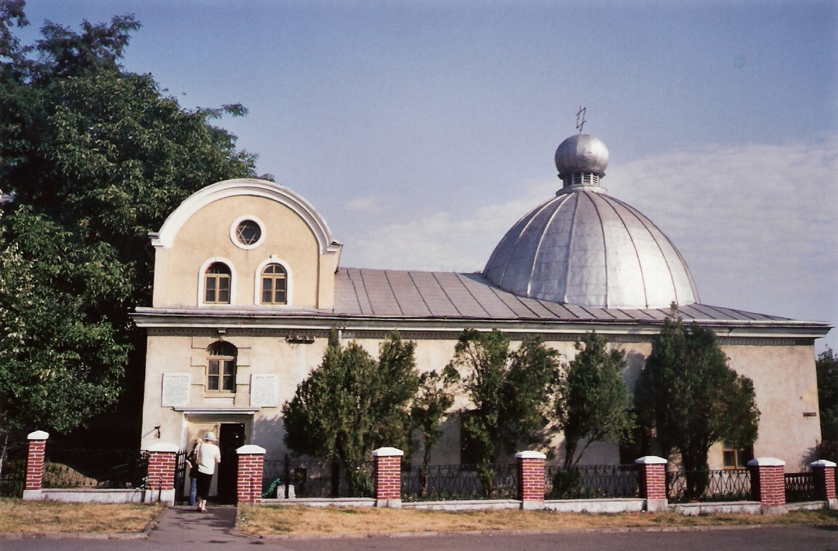 great synagogue in iasi,rumania